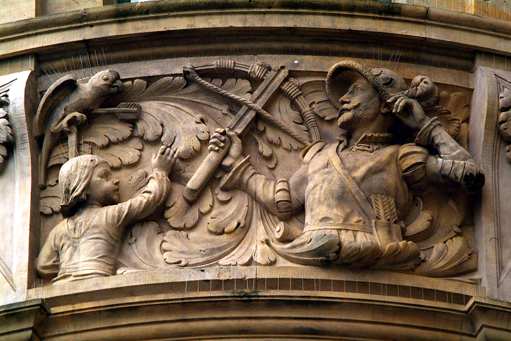 Das Papageienschießen fand tatsächlich regelmäßig in Hannover statt, allerdings wurde im Mittelalter nicht auf lebendige Papageie geschossen, sondern auf einen bunten "Papageienbaum", den die Schützen auf dem Neustädter Berge mit der Armbrust zu treffen suchten. Das hier dargestellte Relief ist Teil des halbplastischen Geschichts- oder auch "Bilderfrieses" am Neuen Rathaus in Hannover und nimmt das Thema Schützenfest der Stadt auf; der Bildhauer ist noch unidentifiziert ...